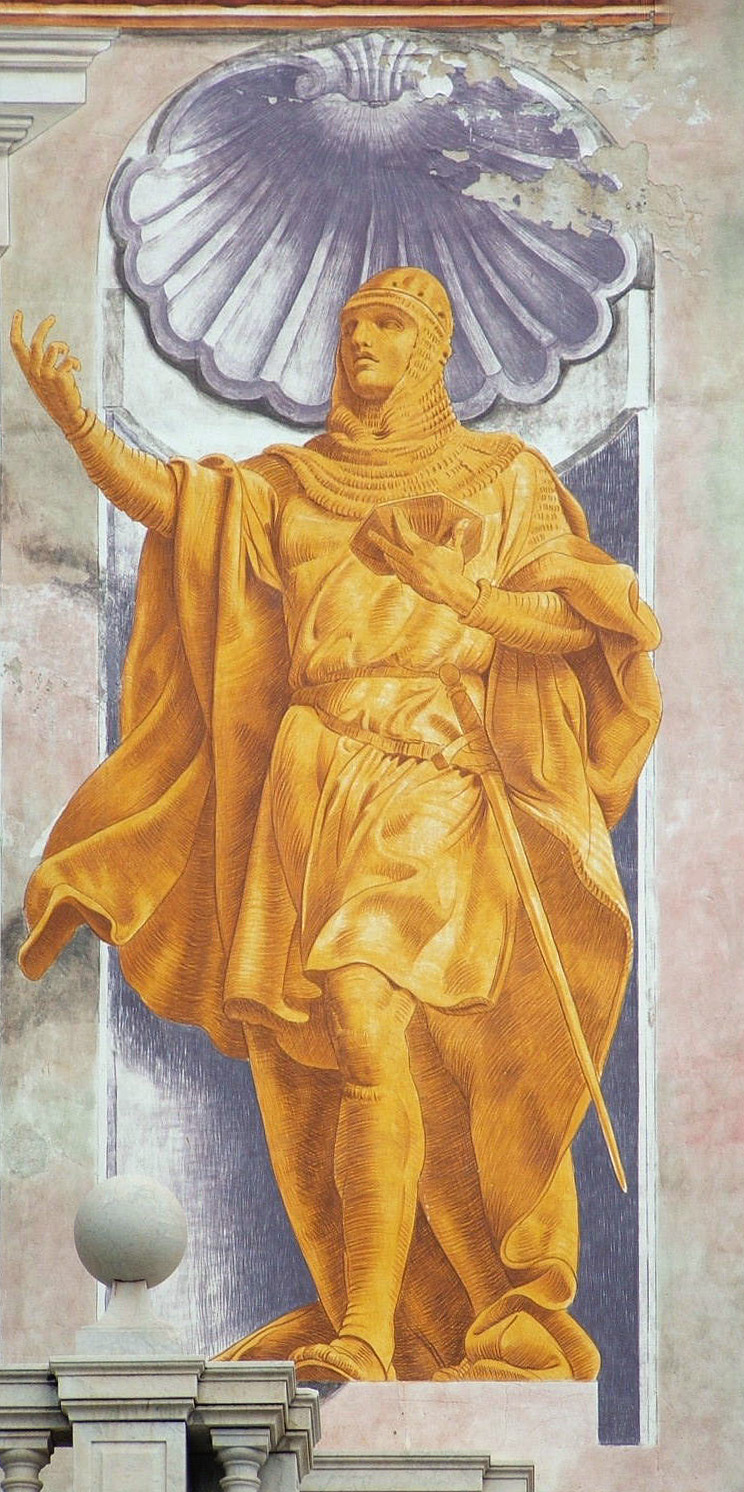 terza immagine da destra sulla facciata principale